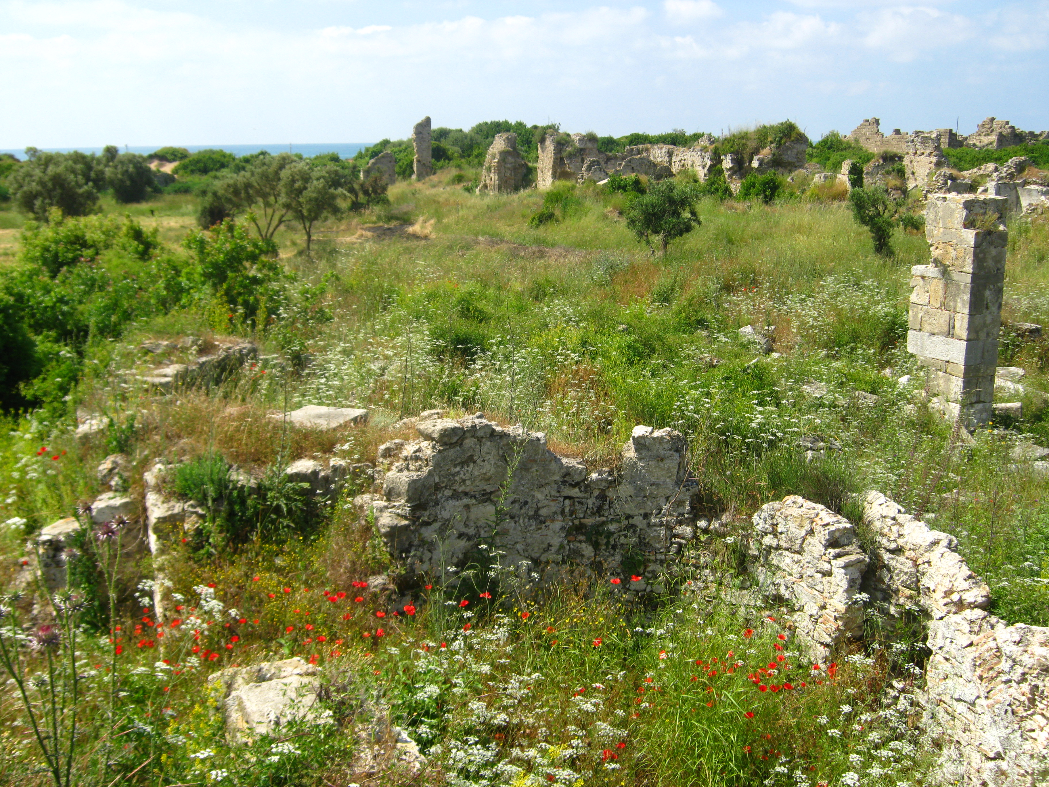 Загальний вигляд руїн "Єпископського палацу"